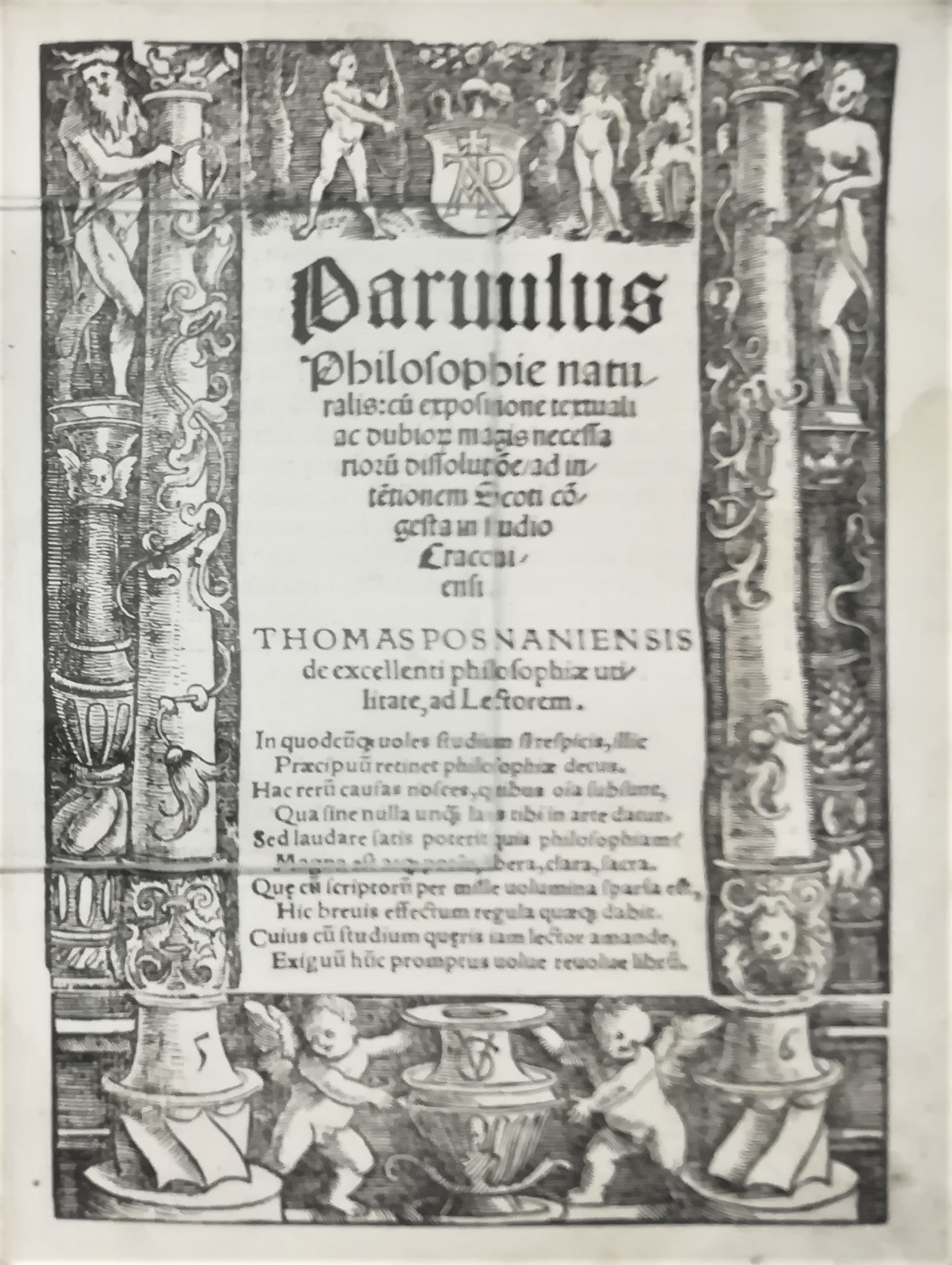 Jan ze Stobnicy - "Parvulus Philosophie..." ze zb. Biblioteki Raczyńskich w Poznaniu.